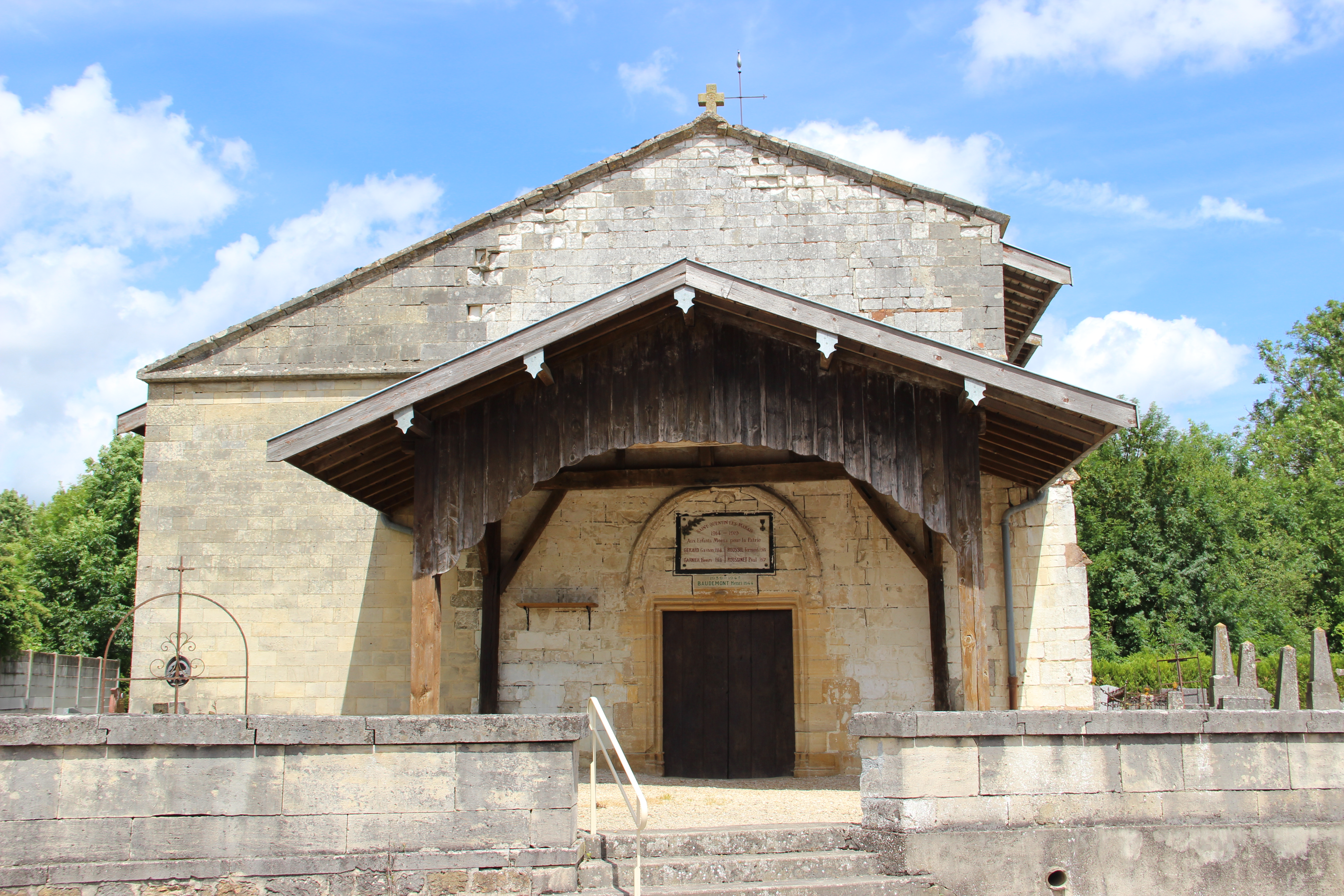 Eglise de Saint-Quentin-les-Marais